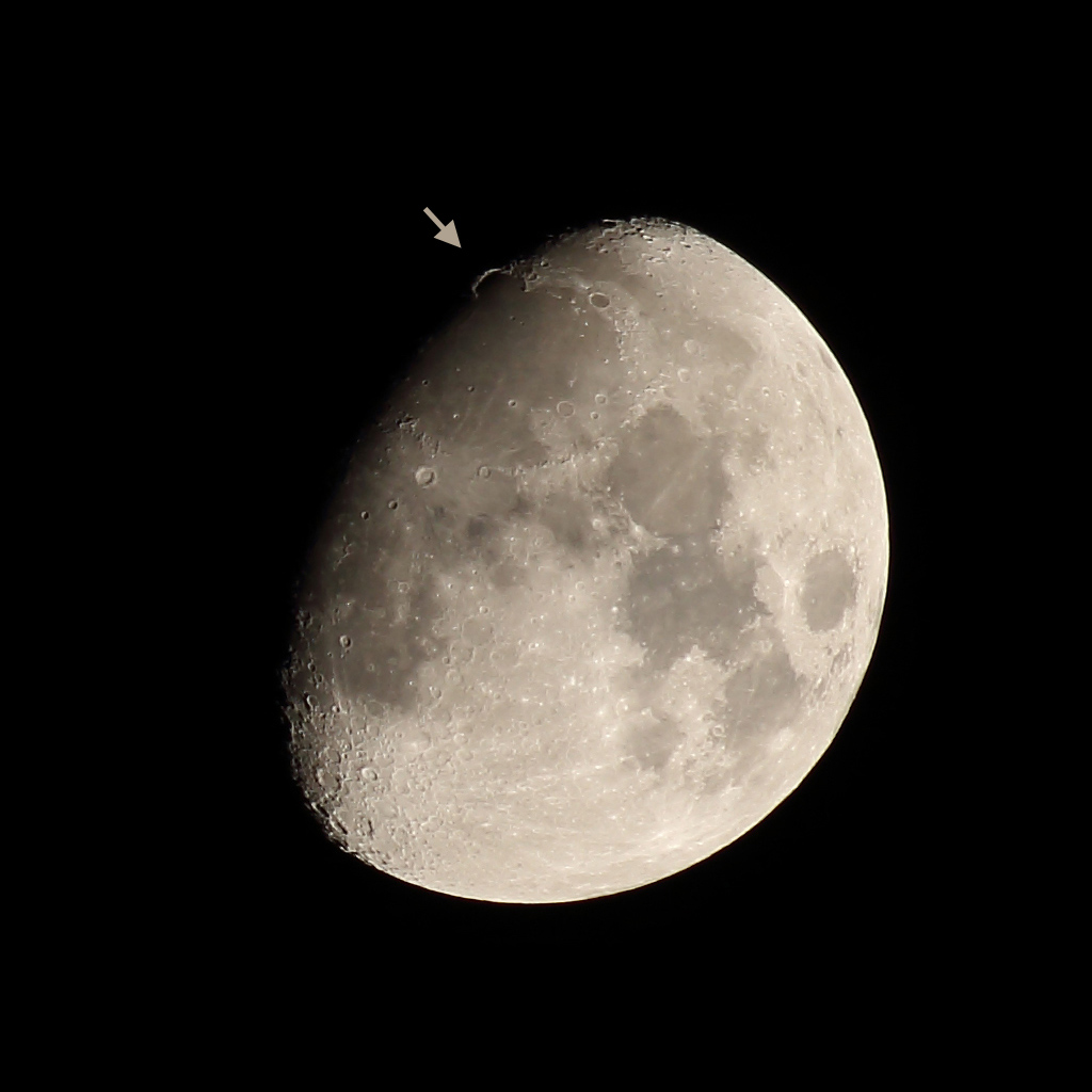 Goldener Henkel Februar 2017